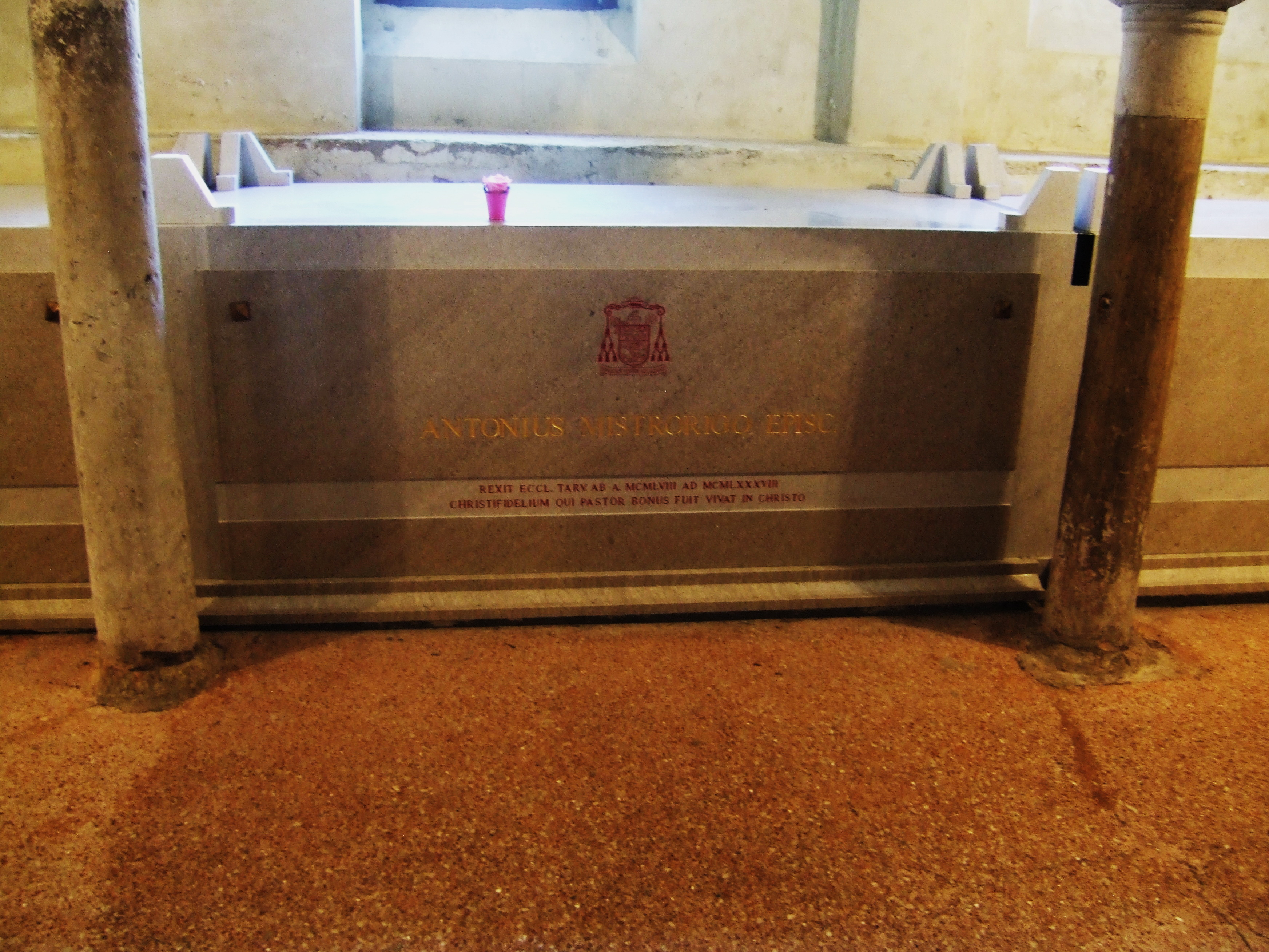 Treviso - Duomo- Cripta Tomba vescovo Mistrorigo